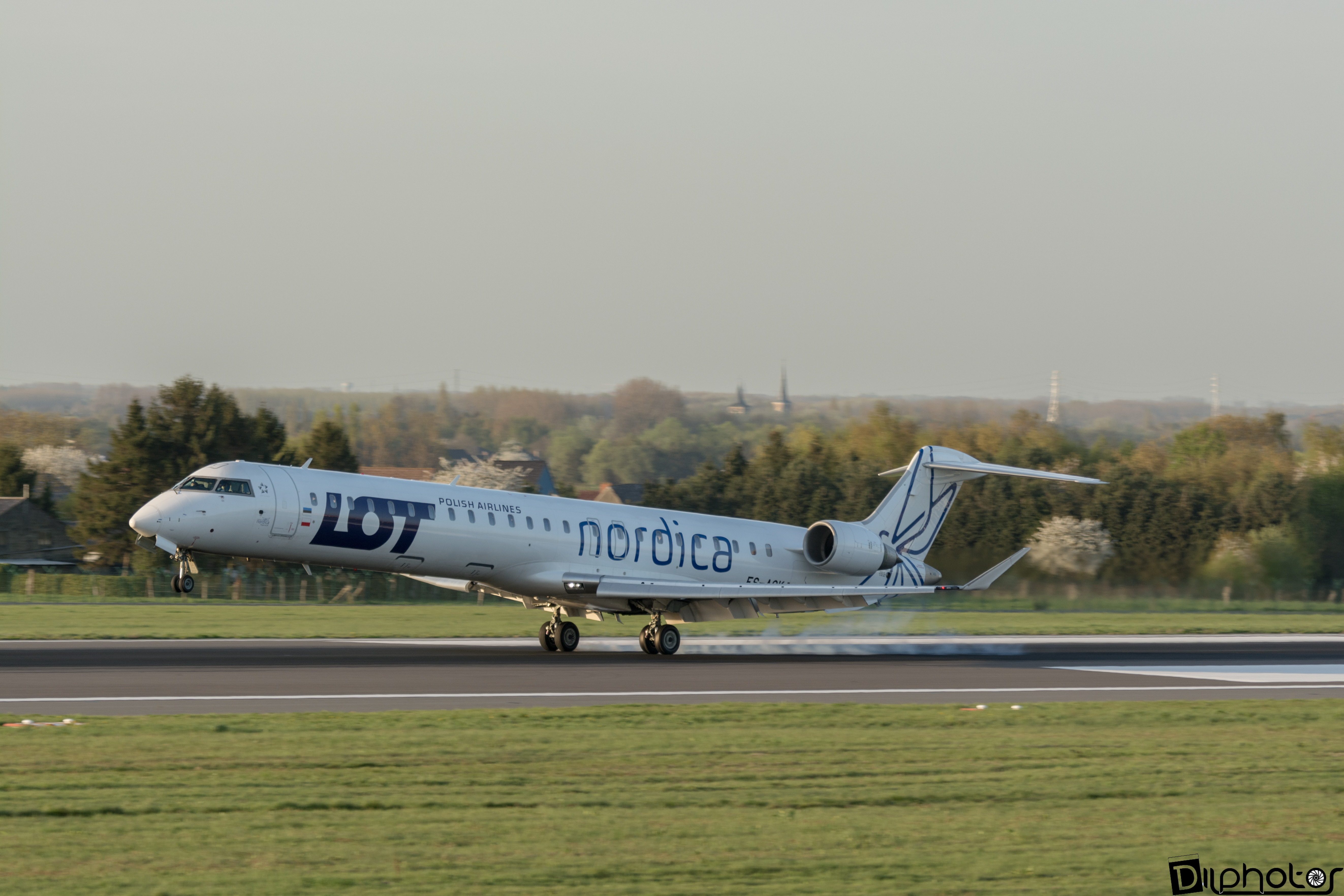 CRJ-900 Nordica à l'atterrissage à Brussels Airport